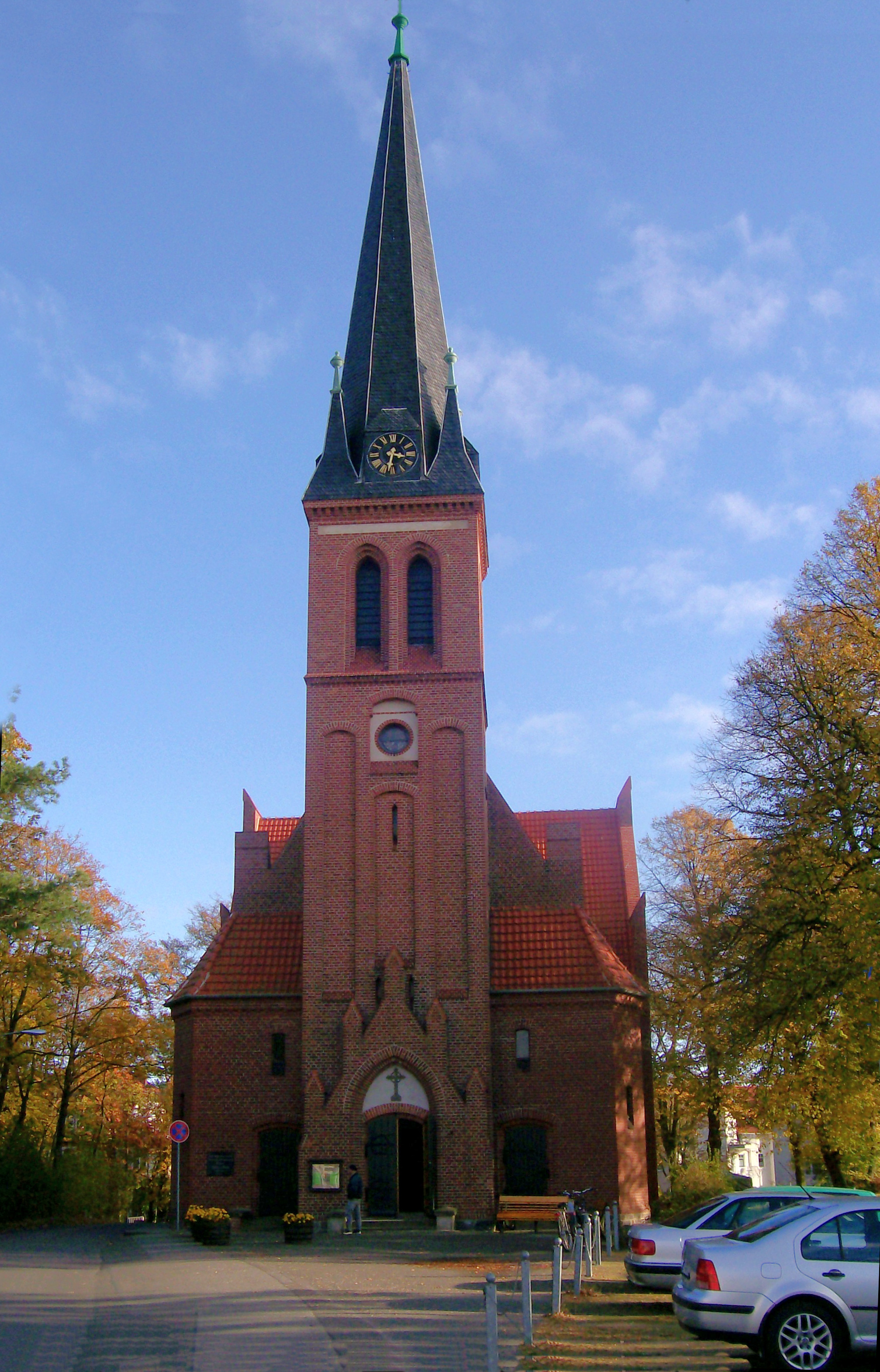 Ahlbecker Kirche in Ahlbeck, Ortsteil von Heringsdorf auf Usedom, Mecklenburg-Vorpommern, Westseite